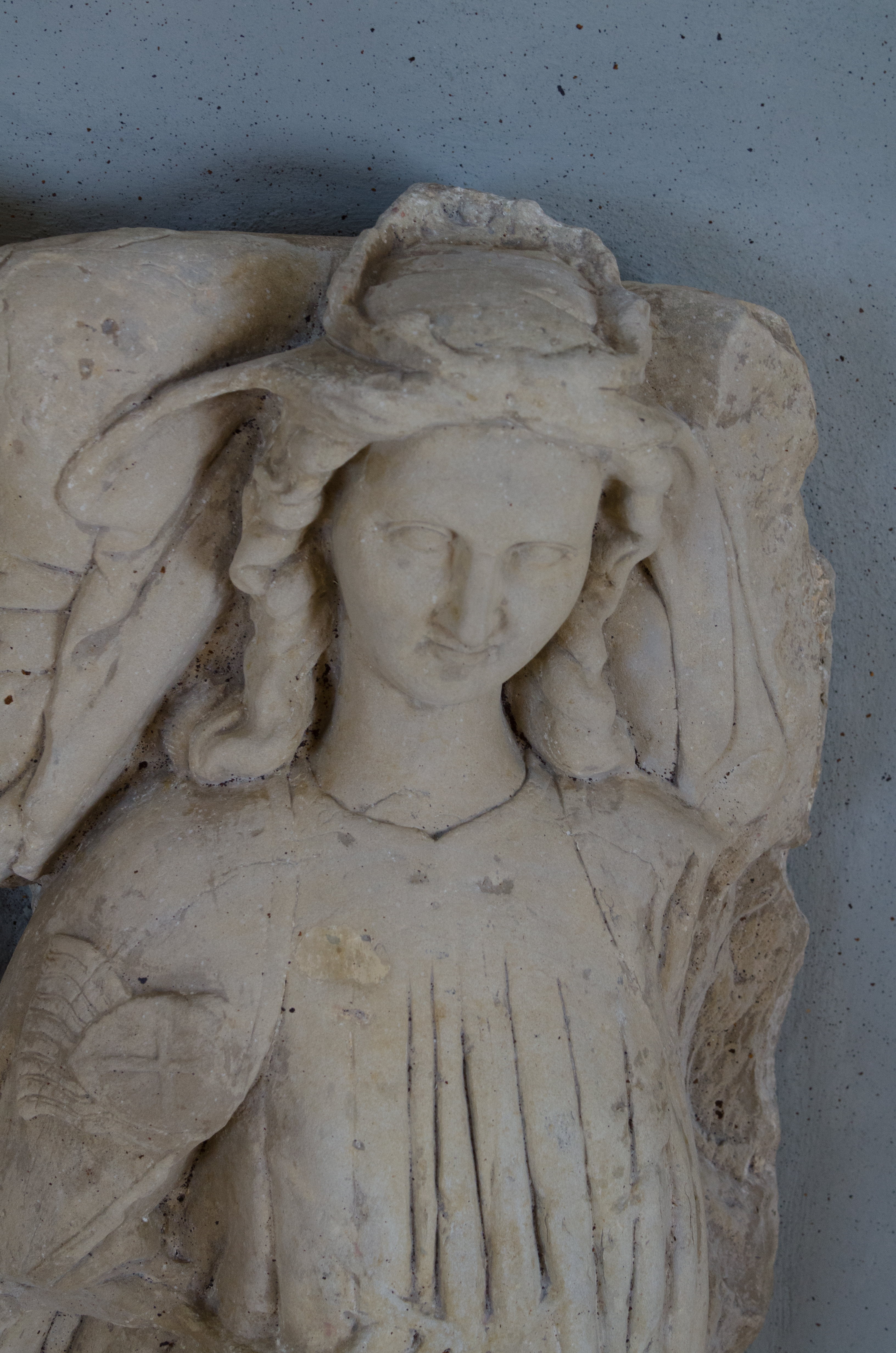 Burkardroth, Frauenroth, ehem. Klosterkirche